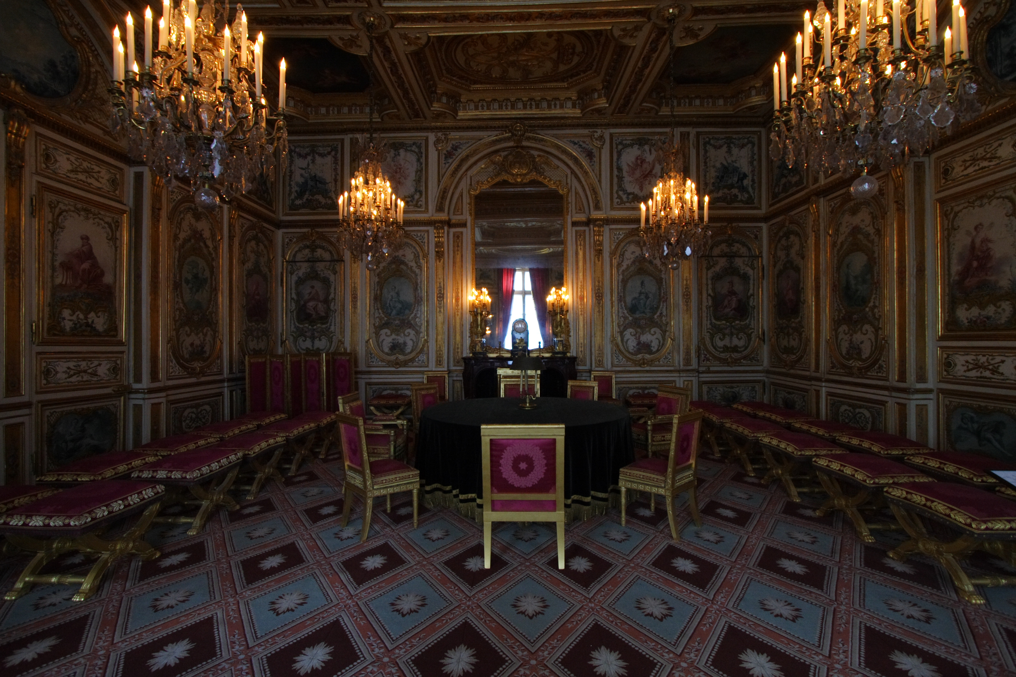 La salle du Conseil au château de Fontainebleau